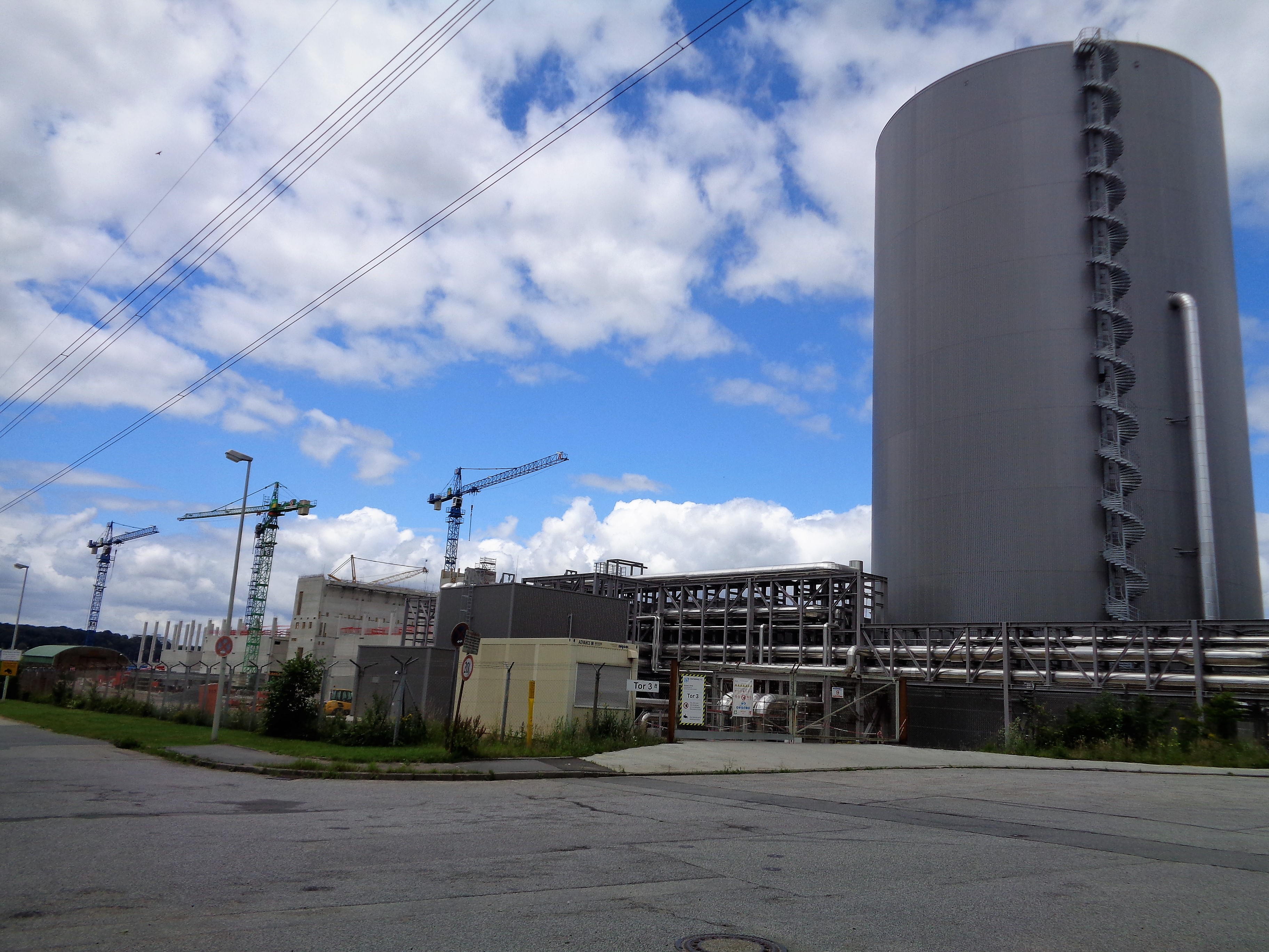 Fortschritt des Neubaus vom Gemeinschaftskraftwerk Kiel.